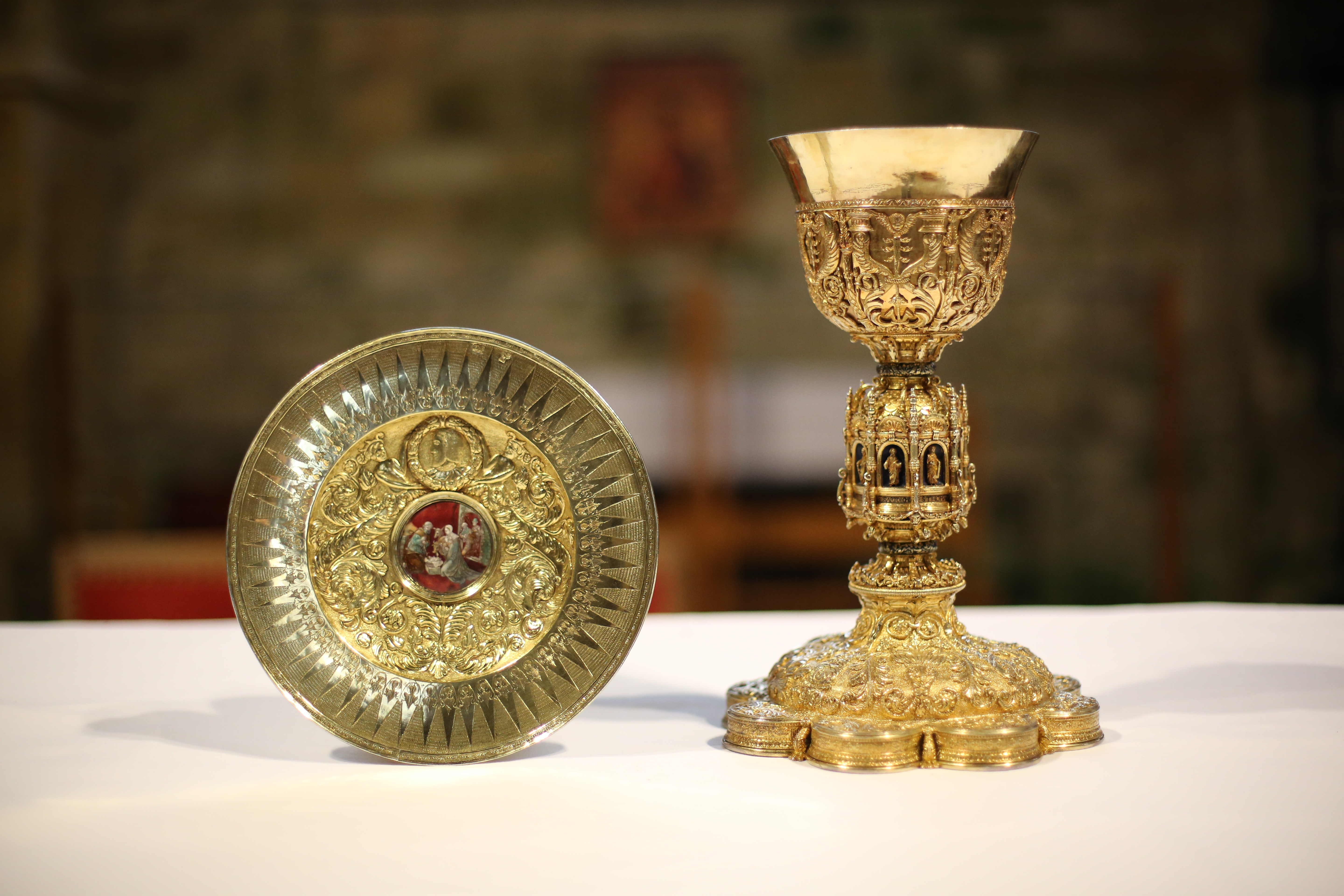 Calice attribué à Guillaume Floch et sa patène.